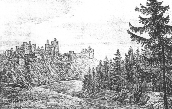 Zřícenina hradu Cornštejn, 1. třetina 19. století